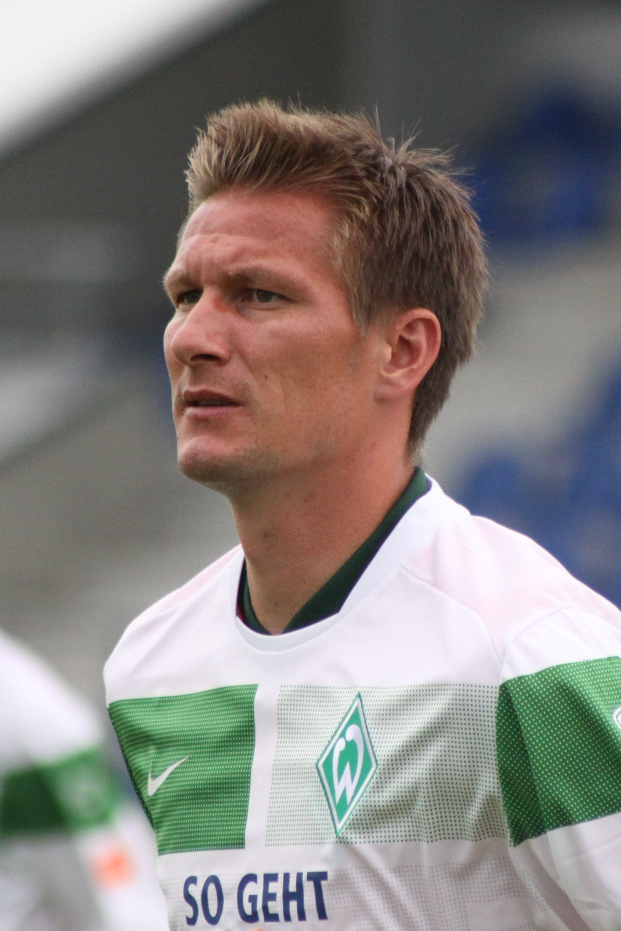 Jurica Vranješ - SV Werder Bremen (1)